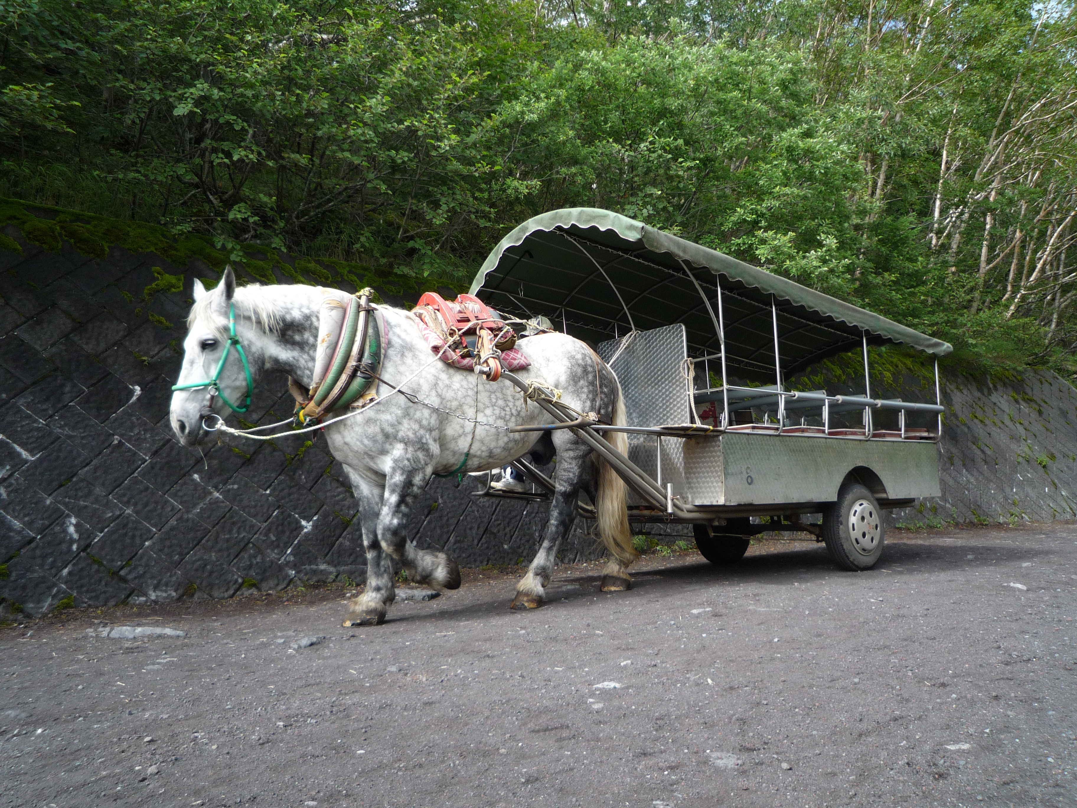 富士山の富士吉田口付近で撮影。富士馬。